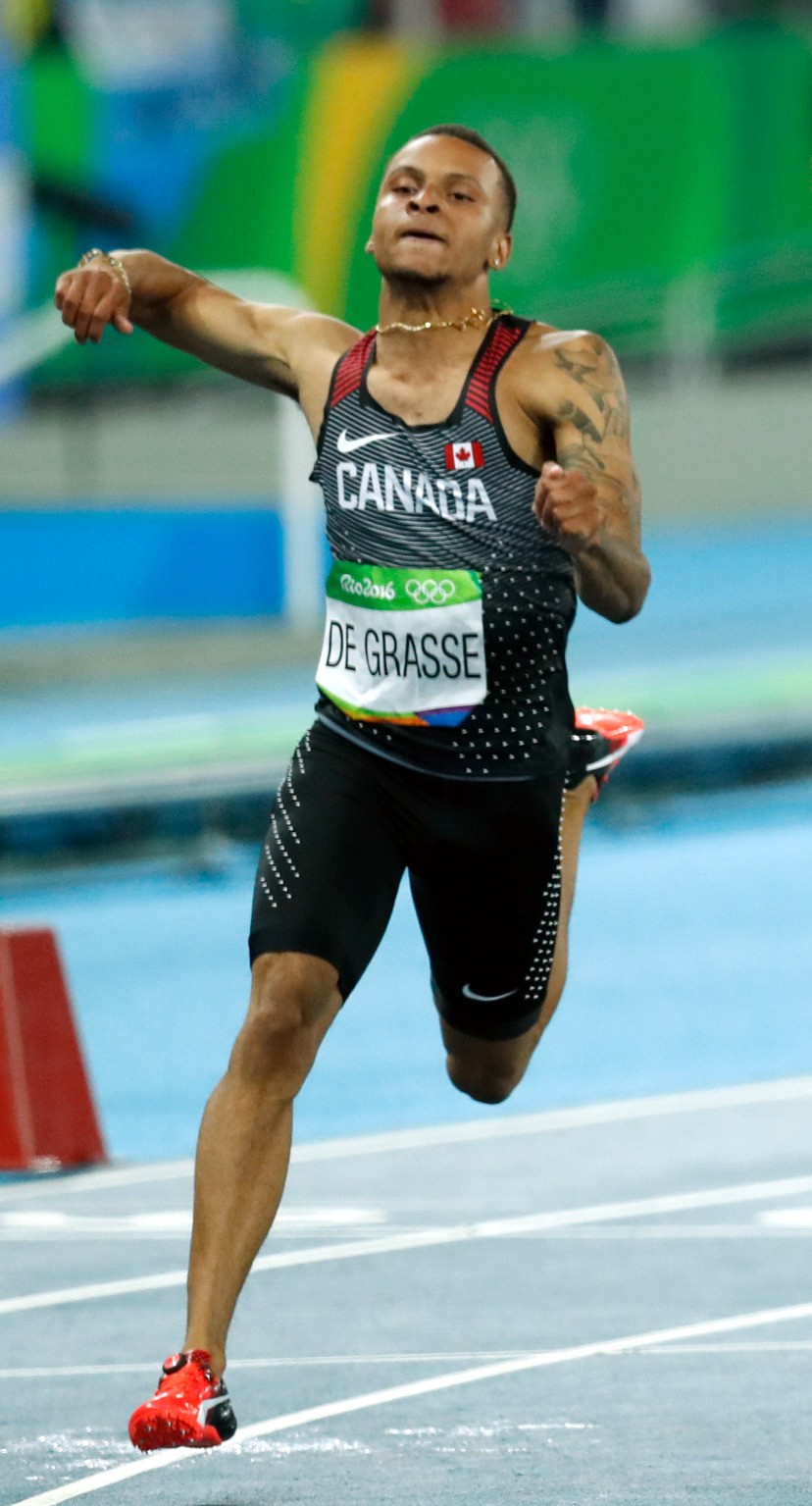 Rio de Janeiro - O jamaicano Usain Bolt, garantiu o ouro e fez história ao conquistar pela terceira vez o título de homem mais rápido do mundo nos 100 metros rasos em uma Olimpíada (Fernando Frazão/Agência Brasil).